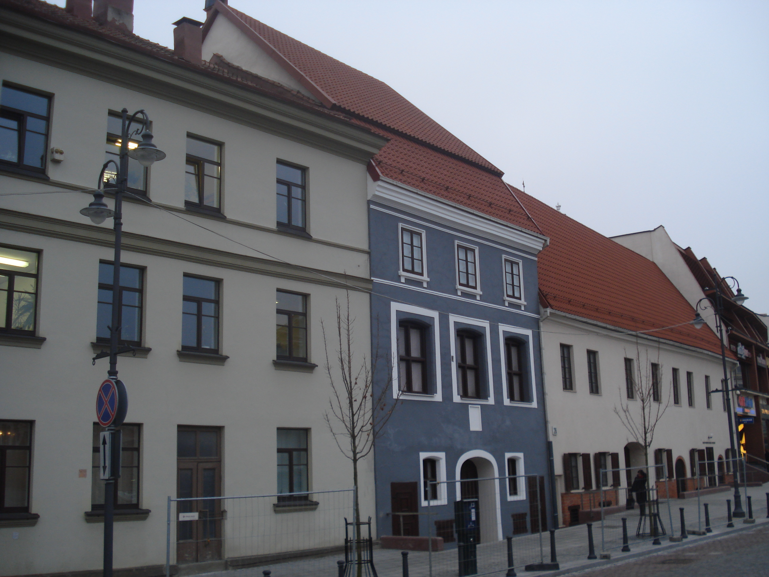 Guildhalls in Town hall Square in Vilnius (Didžioji g. 24, Didžioji g. 26)